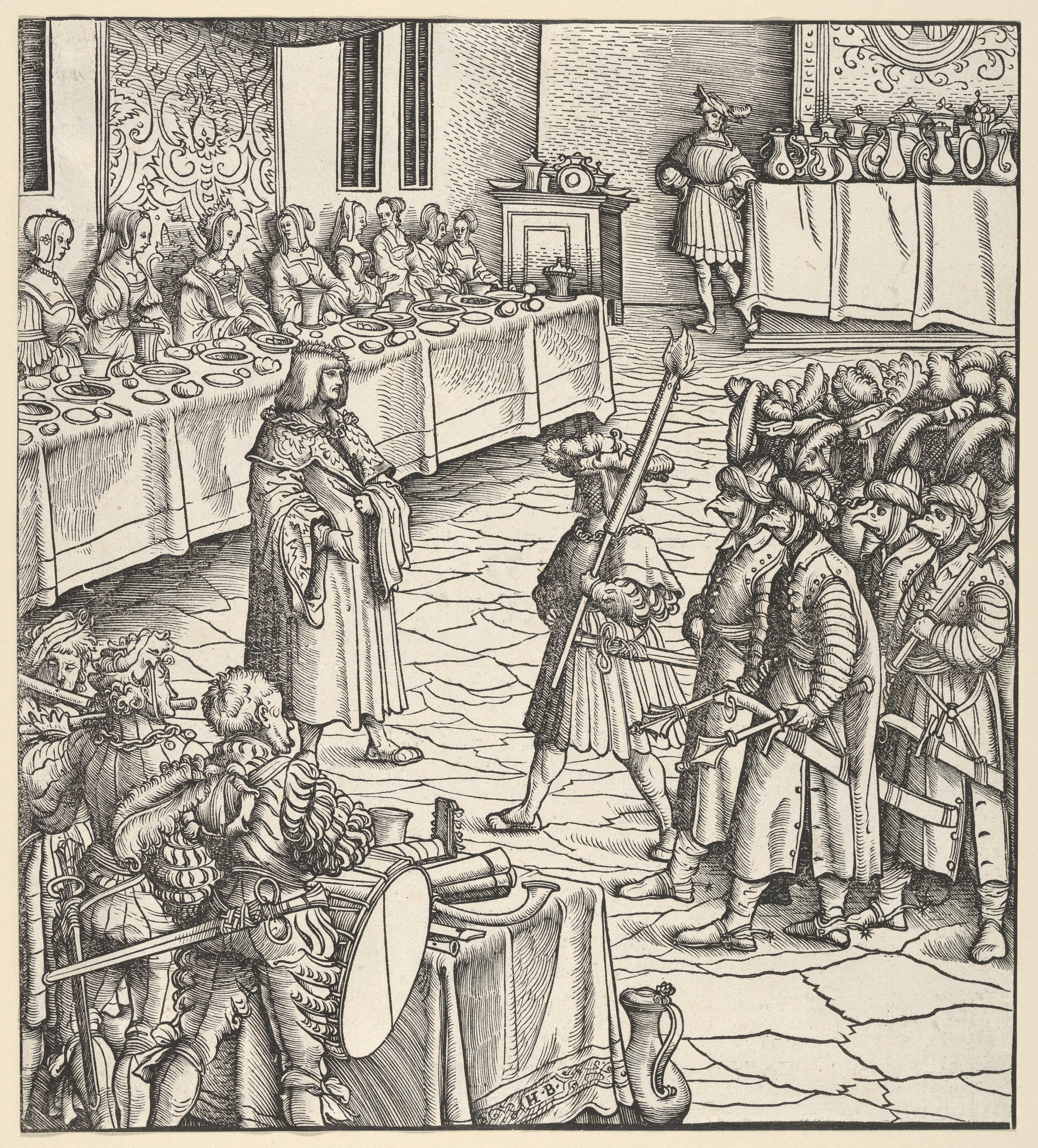 Woodcut. From Der Weisskunig.